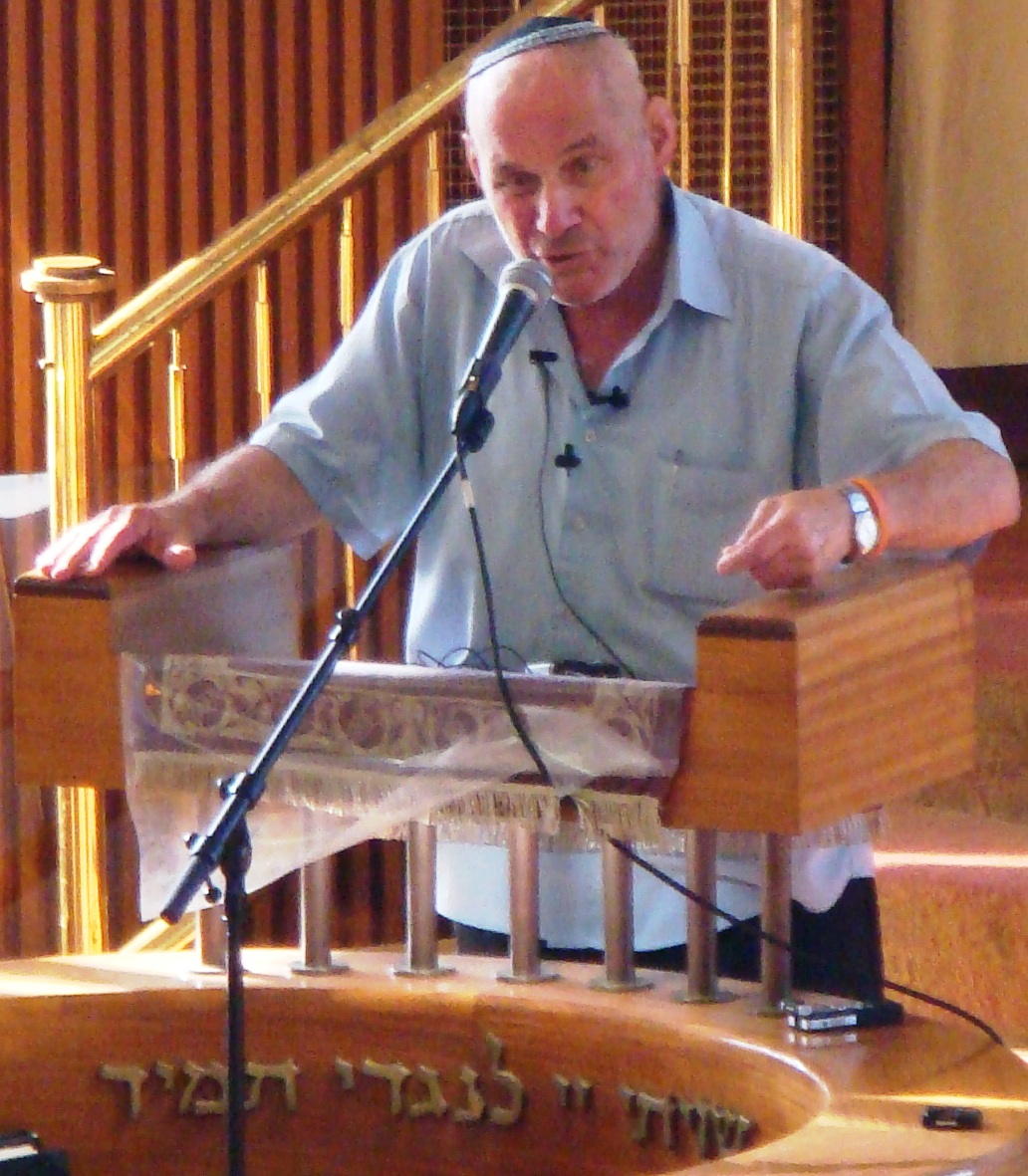 הרב חנן פורת ביום עיון לתנ"ך באלון שבות, ג' באב ה'תש"ס, 14ביולי 2010.